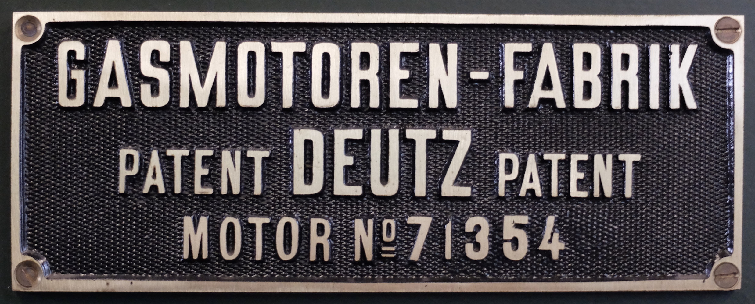 Fabrikschild der Petroleumlok Typ 3514 von 1913, heute beheimatet im Eisenbahnmuseum Bochum-Dahlhausen